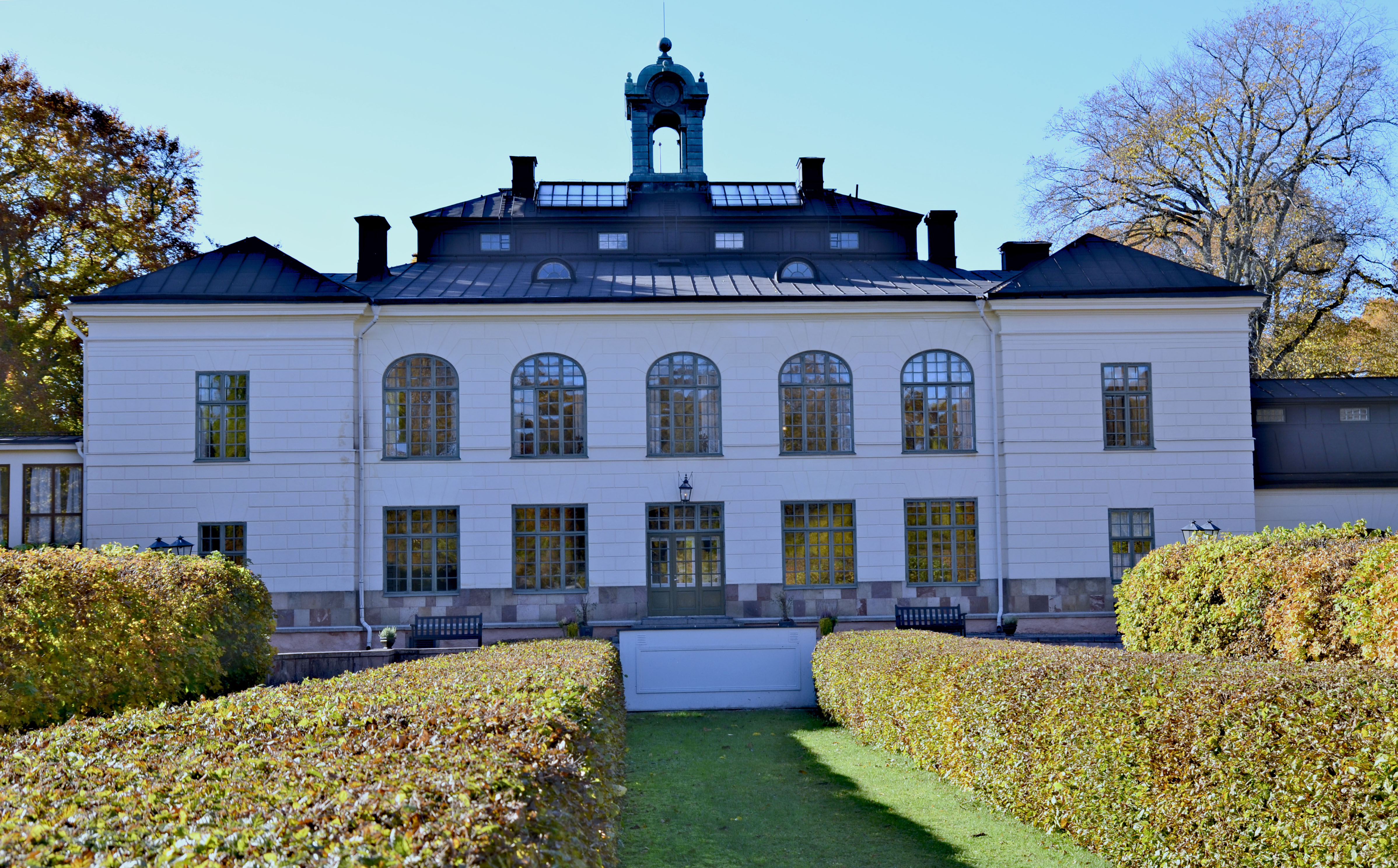 Solbelysta bosqueer framför terrassen på Näsby slotts baksida.